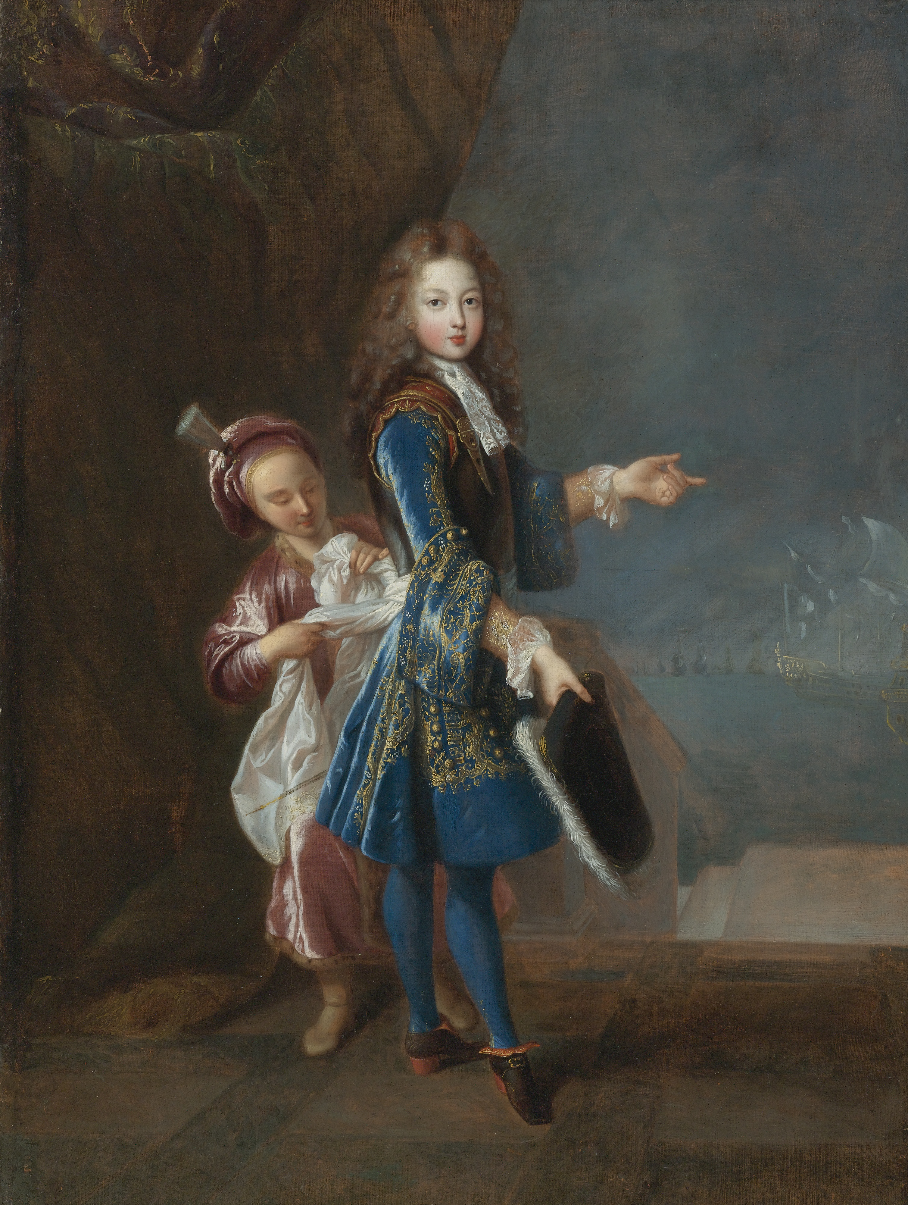 Portrait de Louis Alexandre de Bourbon (1678-1737), légitimé de France, comte de Toulouse